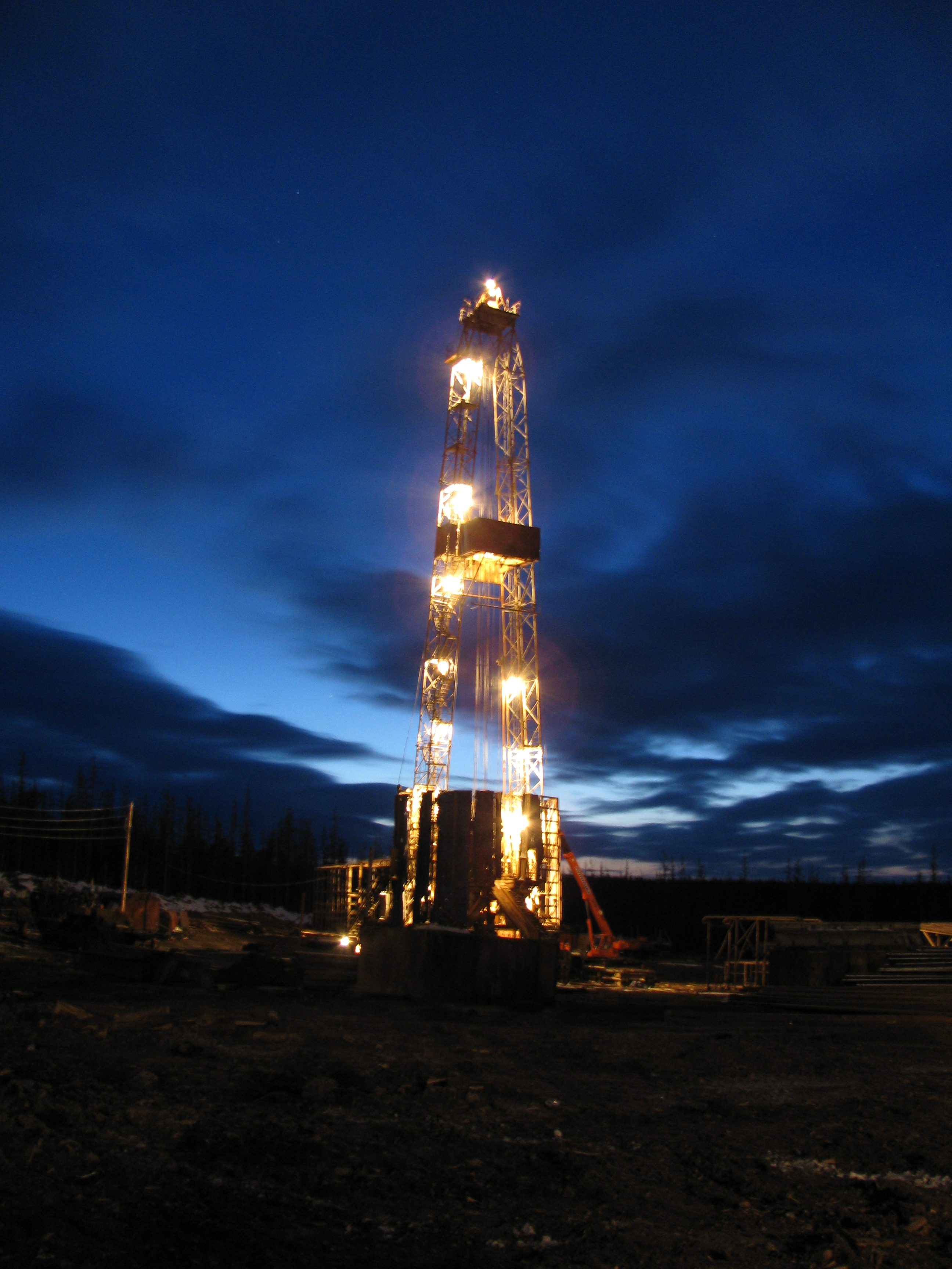 А вот тут красиво вышло. Да и без трактора. Вышка Абракупчинская.